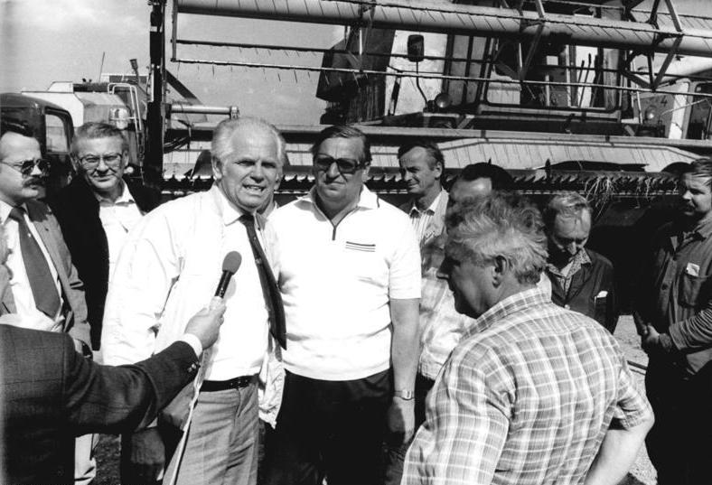 LPG Rannstedt, Besuch von Günther Maleuda ADN-ZB Weigelt-A-26.8.87 Bez. Erfurt: Günther Maleuda bei Bauern-In der Kooperation Rannstedt, Kreis Apolda, informierte sich der Vorsitzende der Demokratischen Bauernpartei Deutschlands und Stellvertreter des Vorsitzenden des Staatsrates der DDR, Dr. Günther Maleuda (3.v.l.), über den Fortgang der Ernte. 4.v.l.: Martin Worms, Vorsitzender der Kooperative.